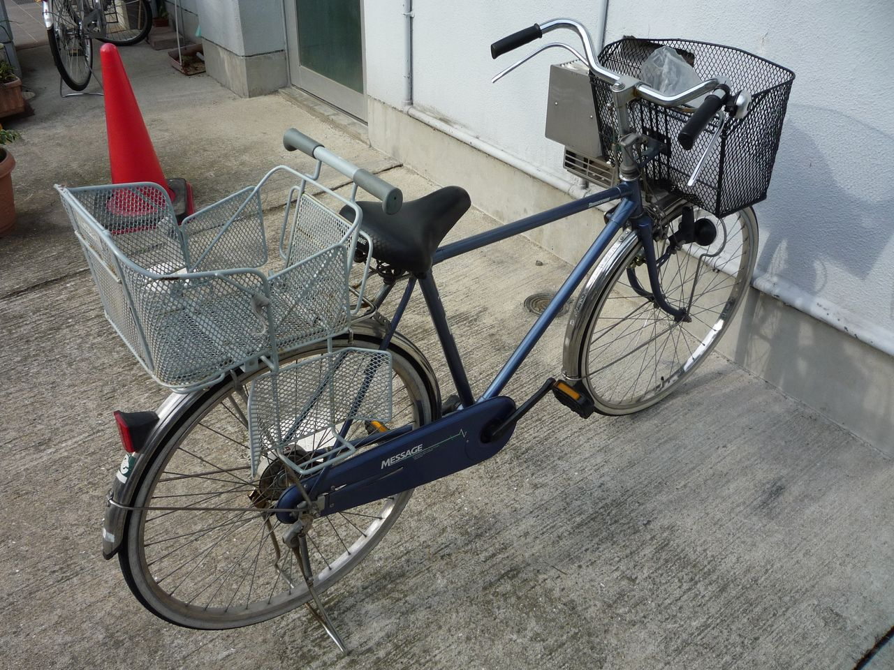 日本の軽快車 ブリヂストン社製「メッセージ」紳士用（1990年代）